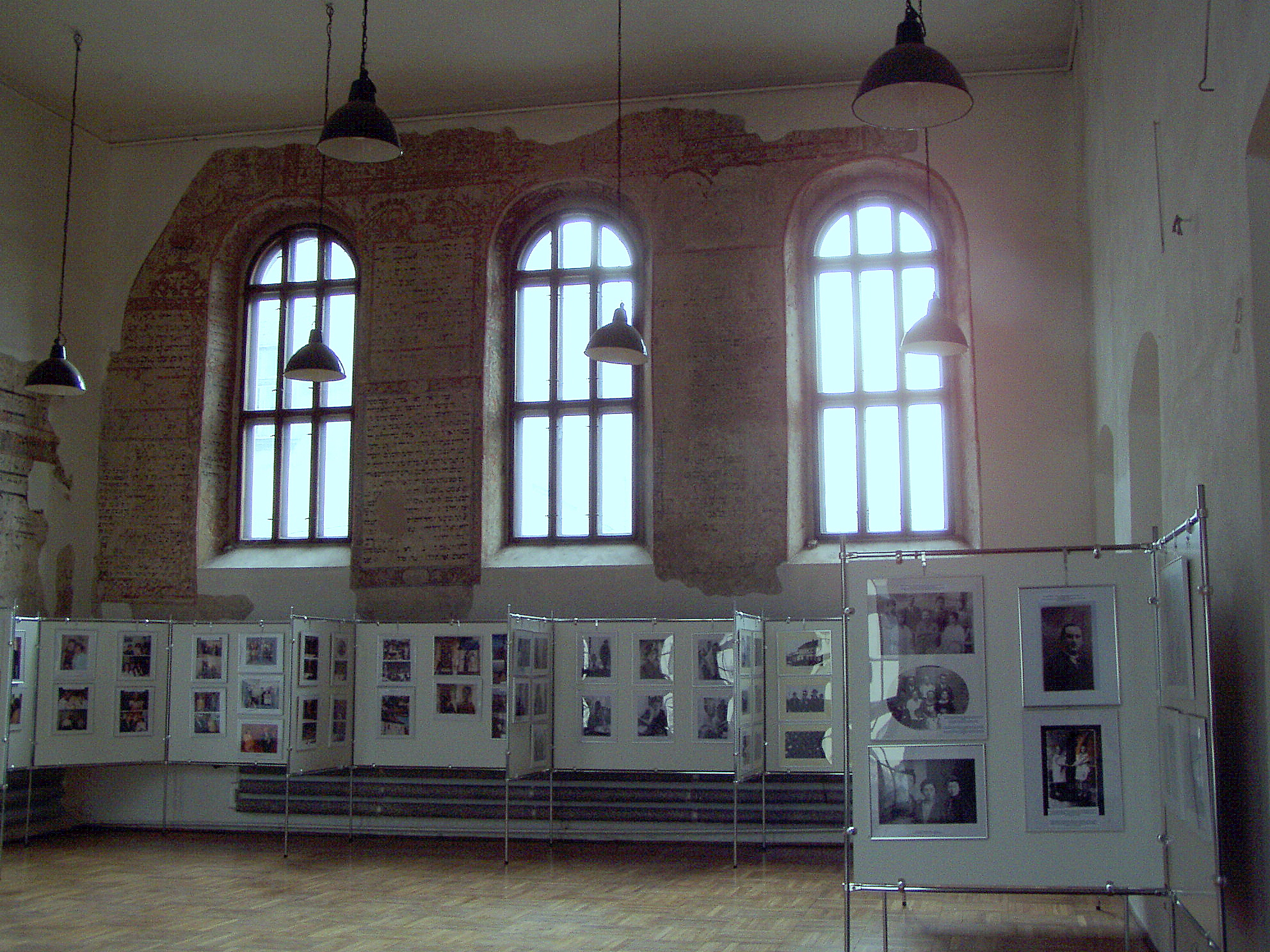 Synagoga Wysoka w Krakowie - sala modlitewna